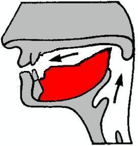 Gutturaal fonetiek